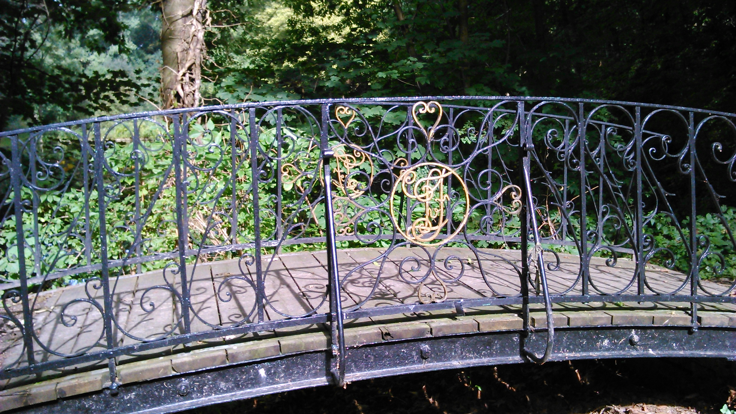 Gut Kaisersruh zwischen Aachen und Würselen; Brücke zwischen den Fischteichen; Initialen des Erbauers des Gutshauses, Ludwig von Fisenne (Domkapitular zu Aachen)